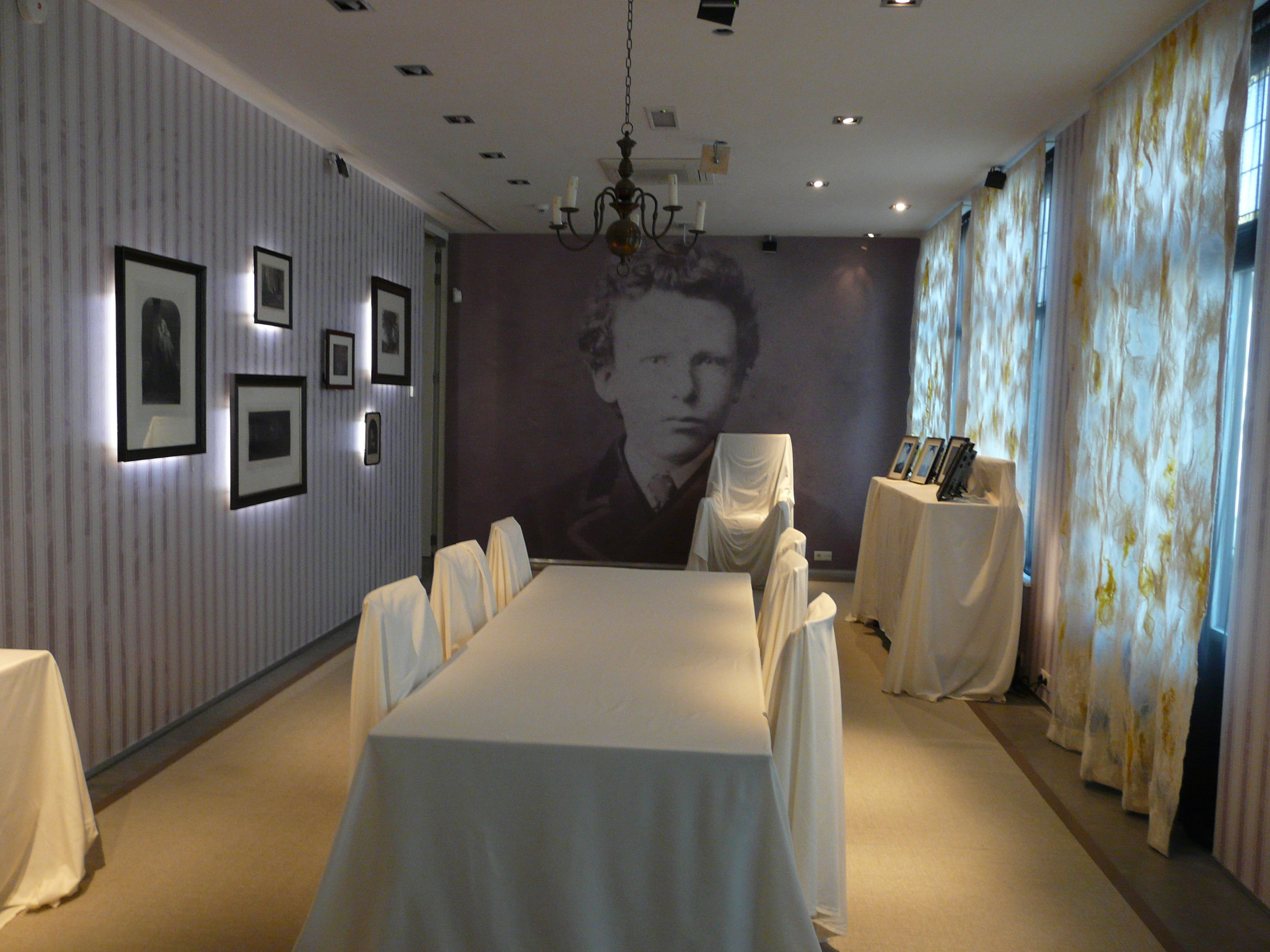 Zicht op een deel van de vaste tentoonstelling De wortels van een meester, over onder andere het leven en de familie van Vincent van Gogh, op de bovenverdieping van het Van Goghhuis in Zundert